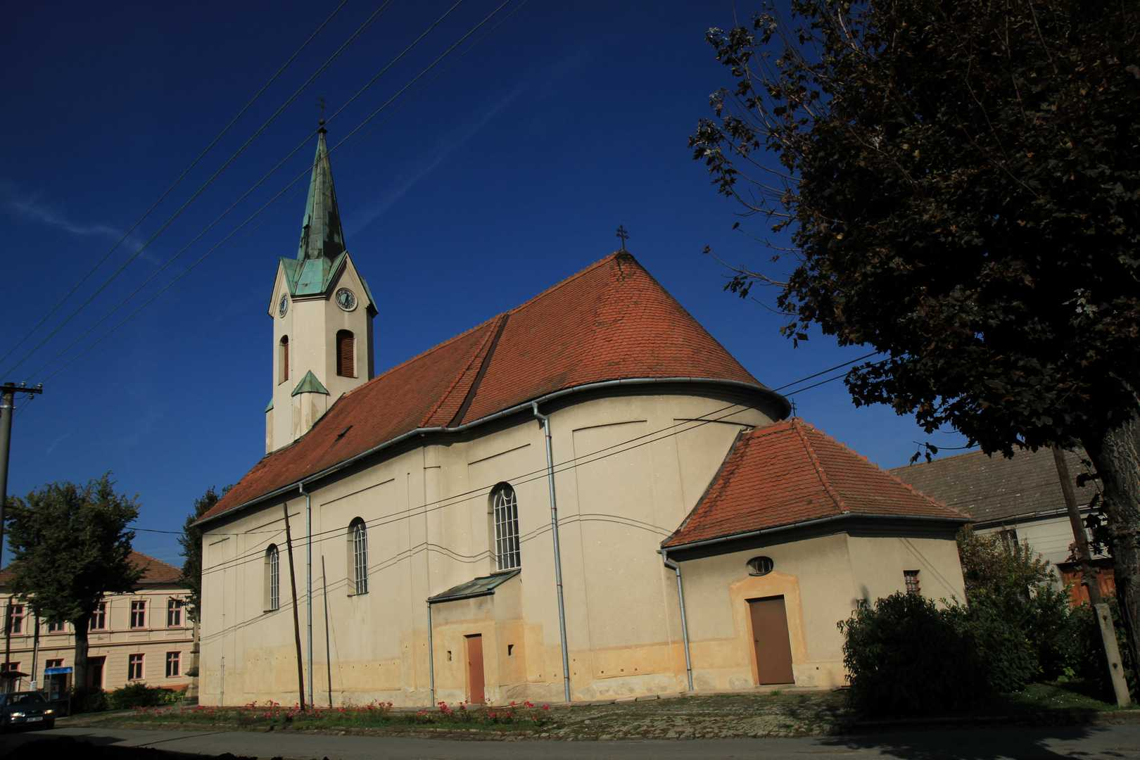 Kostel svatého Prokopa, Čehovice, okres Prostějov, náves.